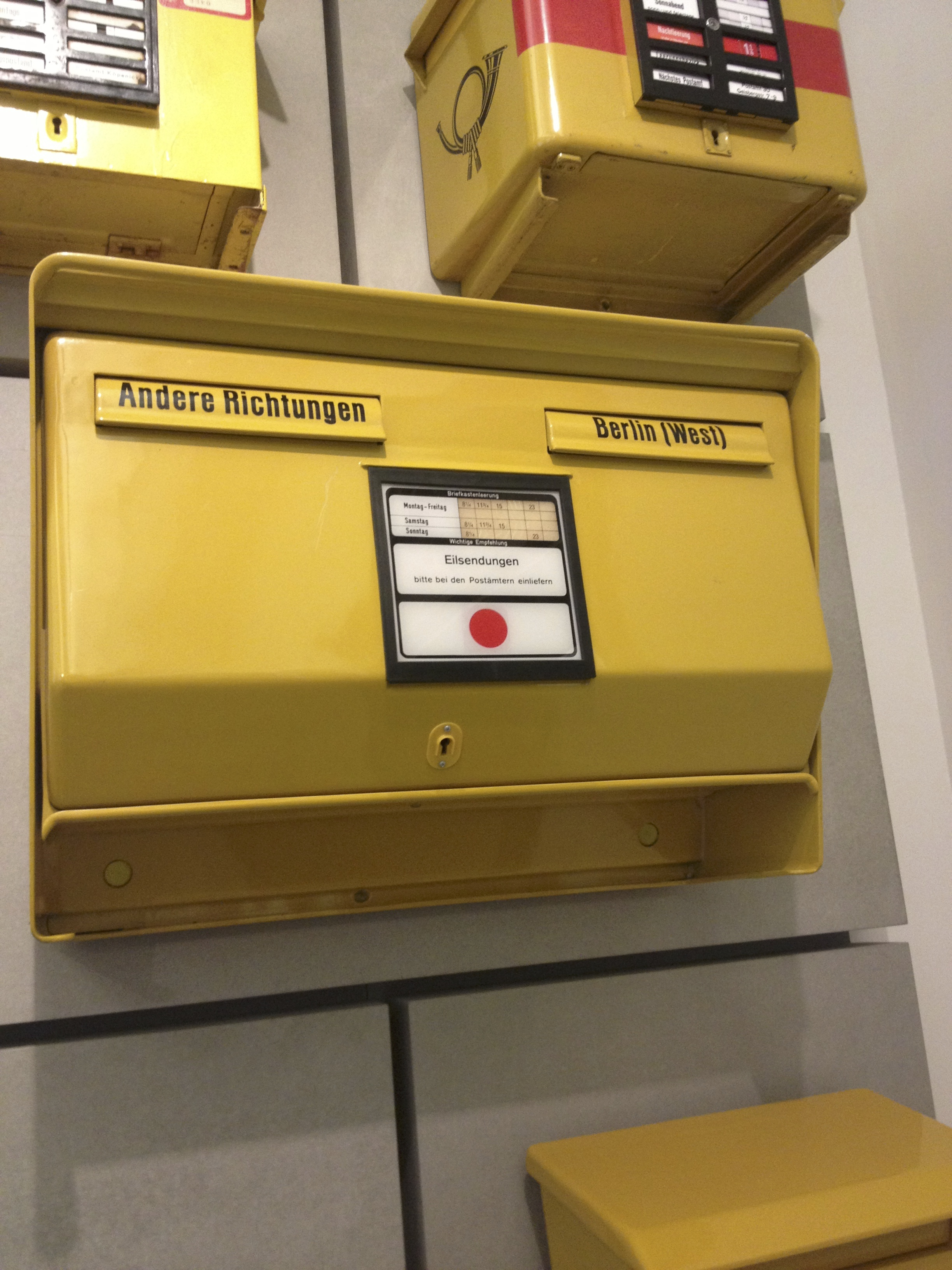 Berliner Postkasten mit zwei Postfächern